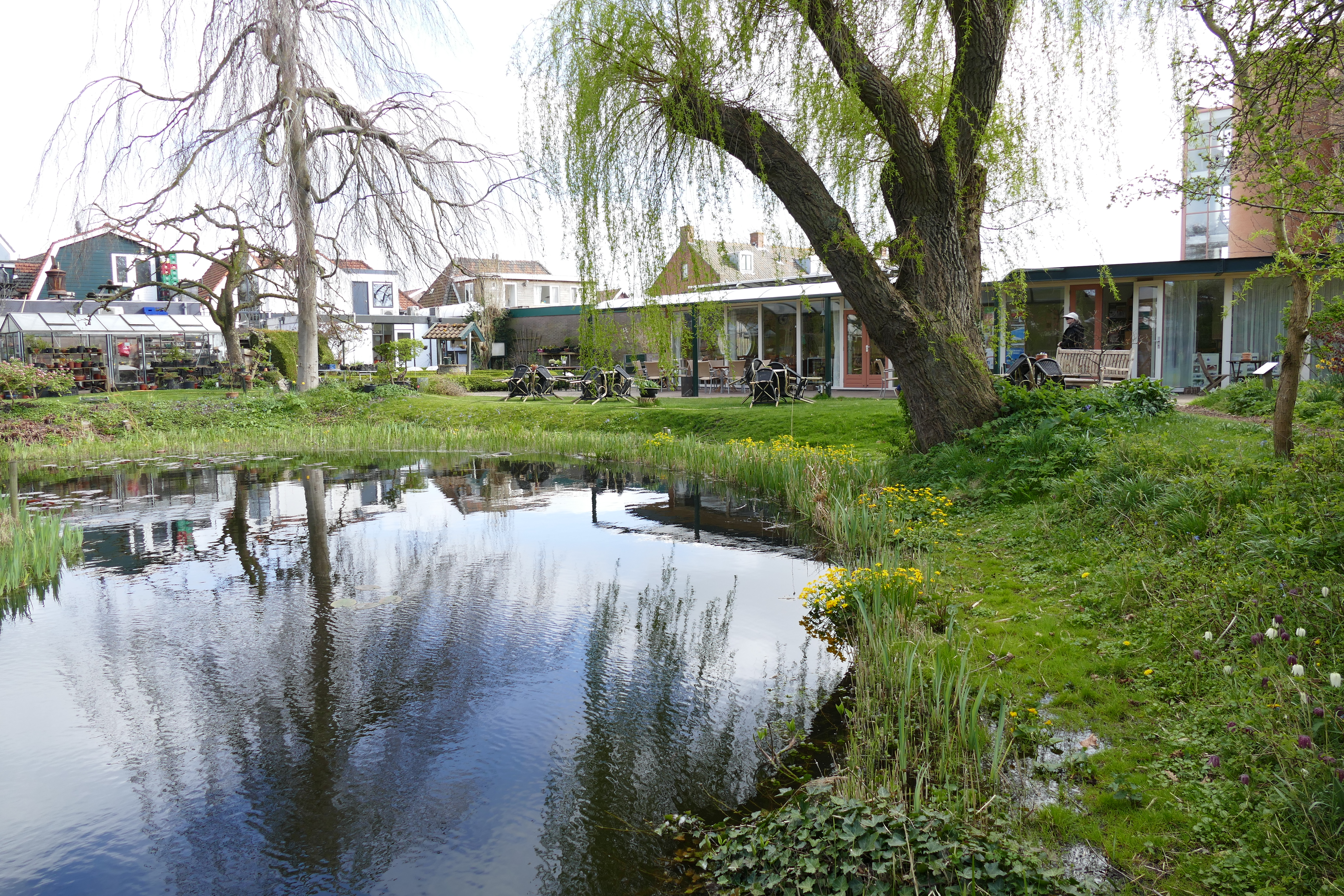 Tuin van kapitein Rommel, Castricum - Vijver en ontmoetingsruimte